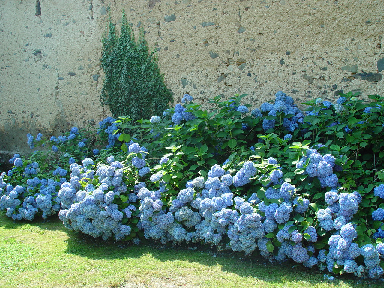 Photographies d'hortensias de l'enclos d'En ço d'Estienne, naturellement bleus du fait de l'eau tombant du toit d'ardoises situé au dessus